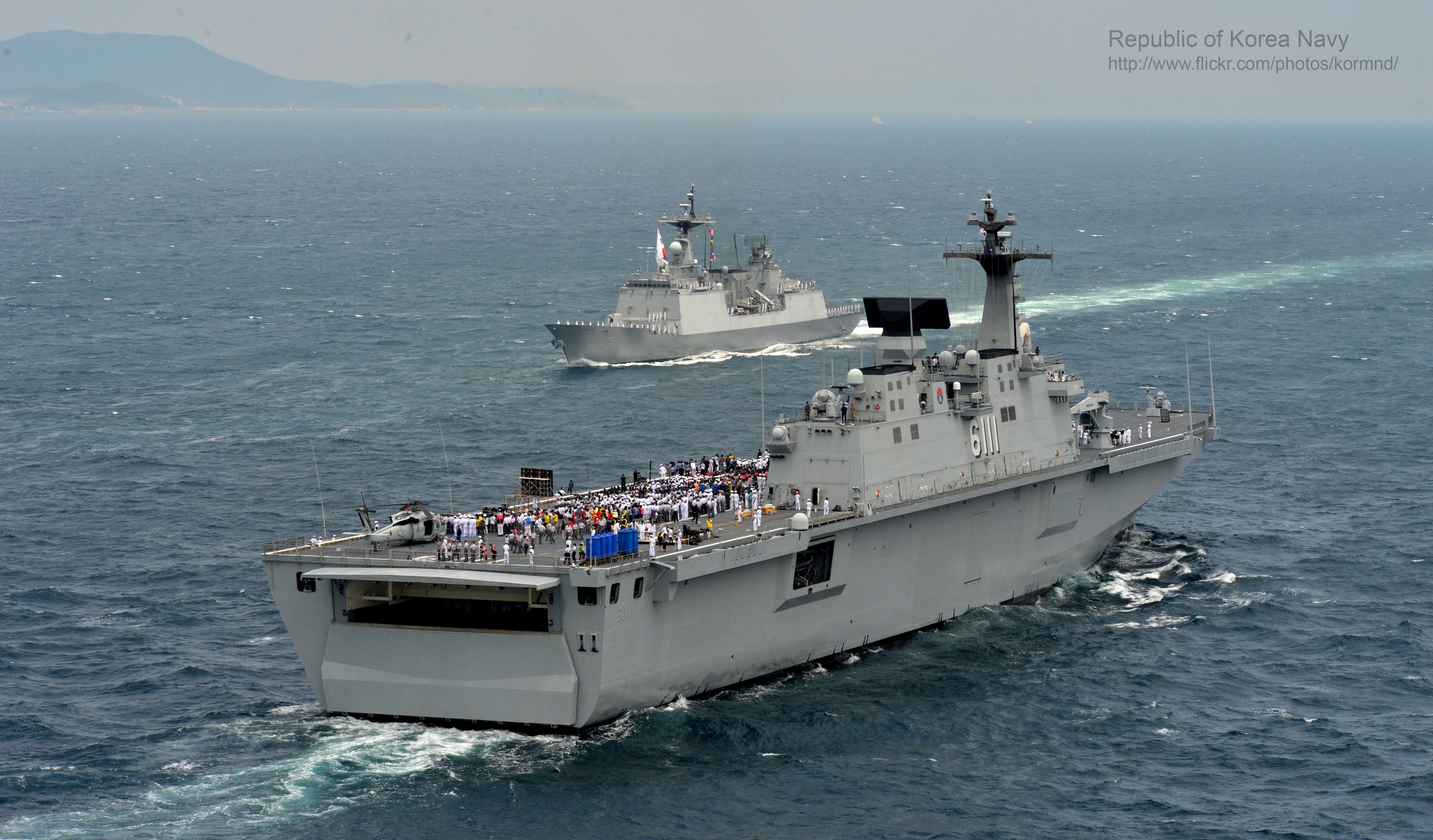 13. 6. 26 부산 인근 해역에서 이지스 구축함, 한국형 구축함, 호위함 등 함정 10여 척과 대잠초계기(P-3C), 대잠헬기(링스) 등이 해상사열과 화력시범을 선보였다. 촬영자 : 채홍강